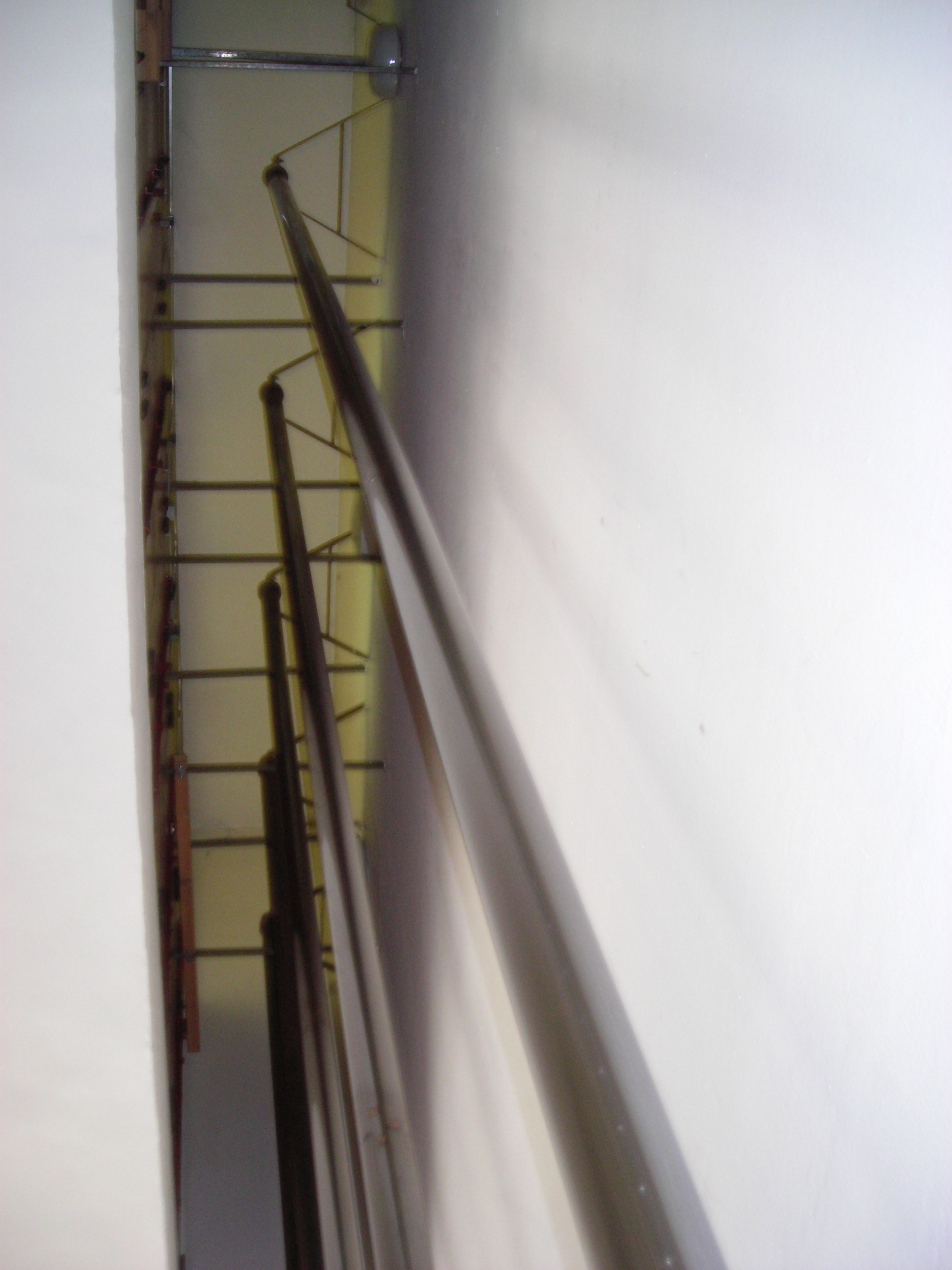 Feuerwehr-Rutschstangen der Feuerwache I München über zwei Stockwerke, Blick vom Gerätehaus nach oben